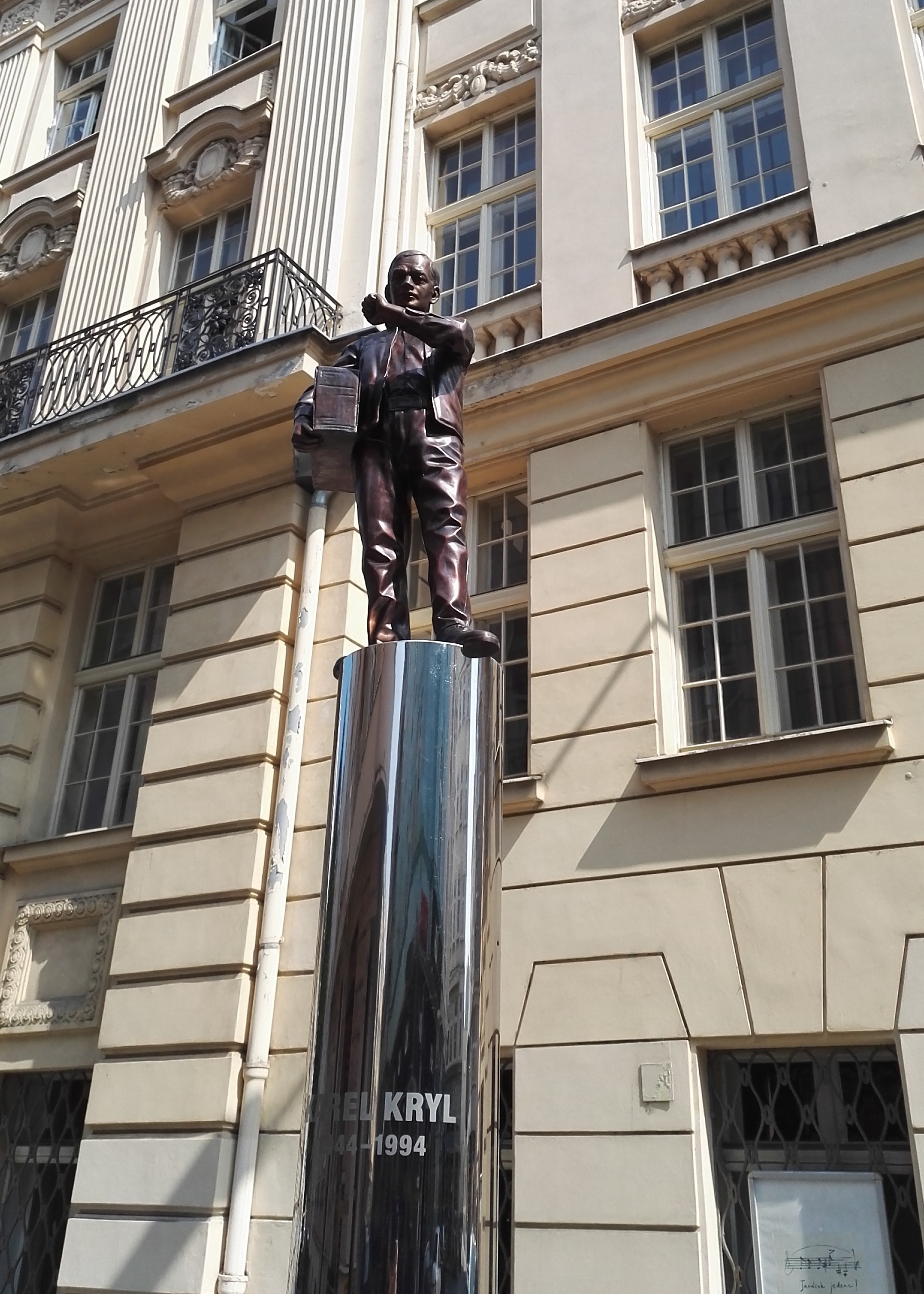 Ostrava